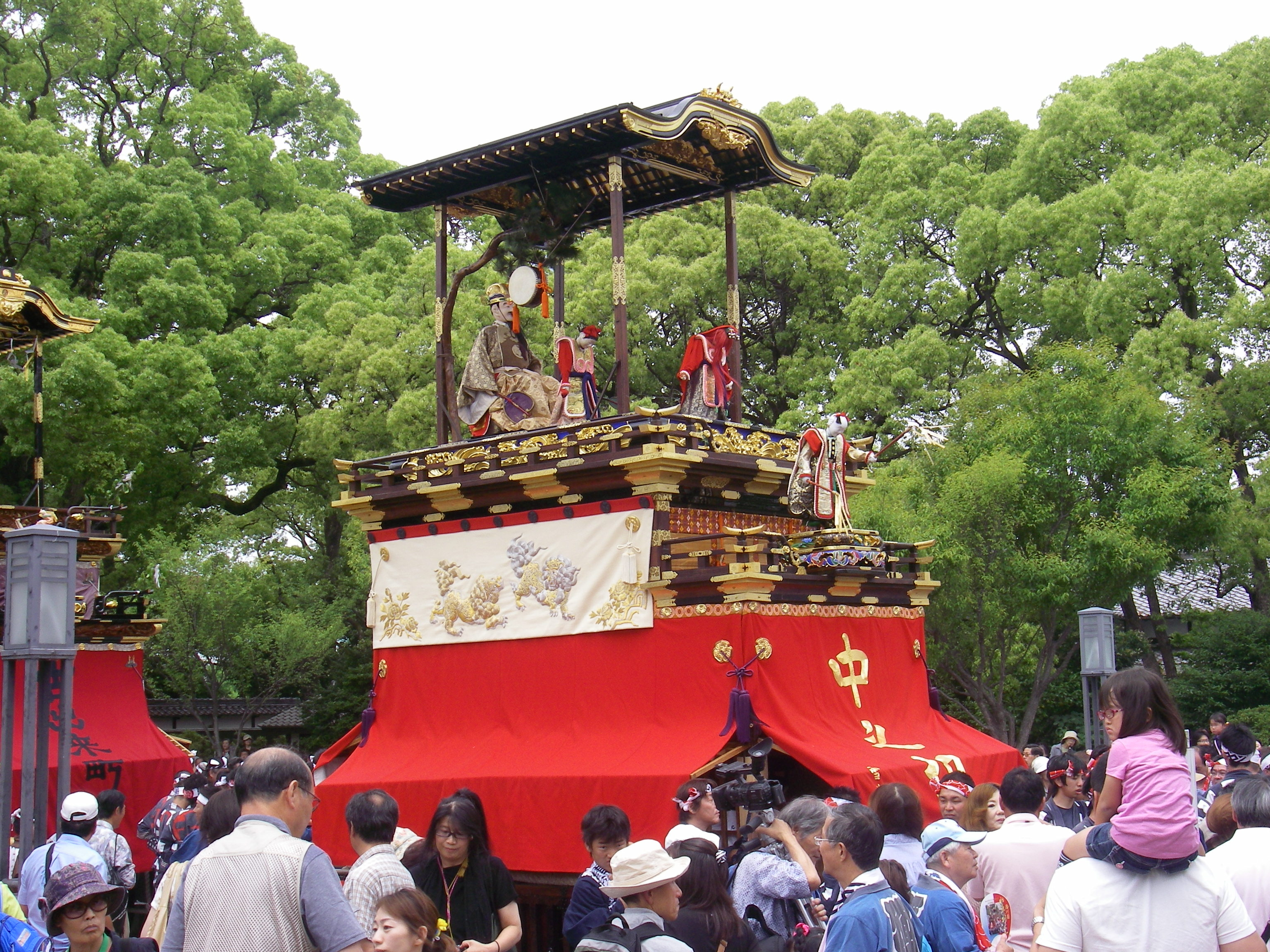 河水車（名古屋市東区出来町）徳川園山車揃えにて